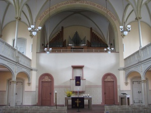 Johannes-Calvin-Kirche in Mannheim-Friedrichsfeld.